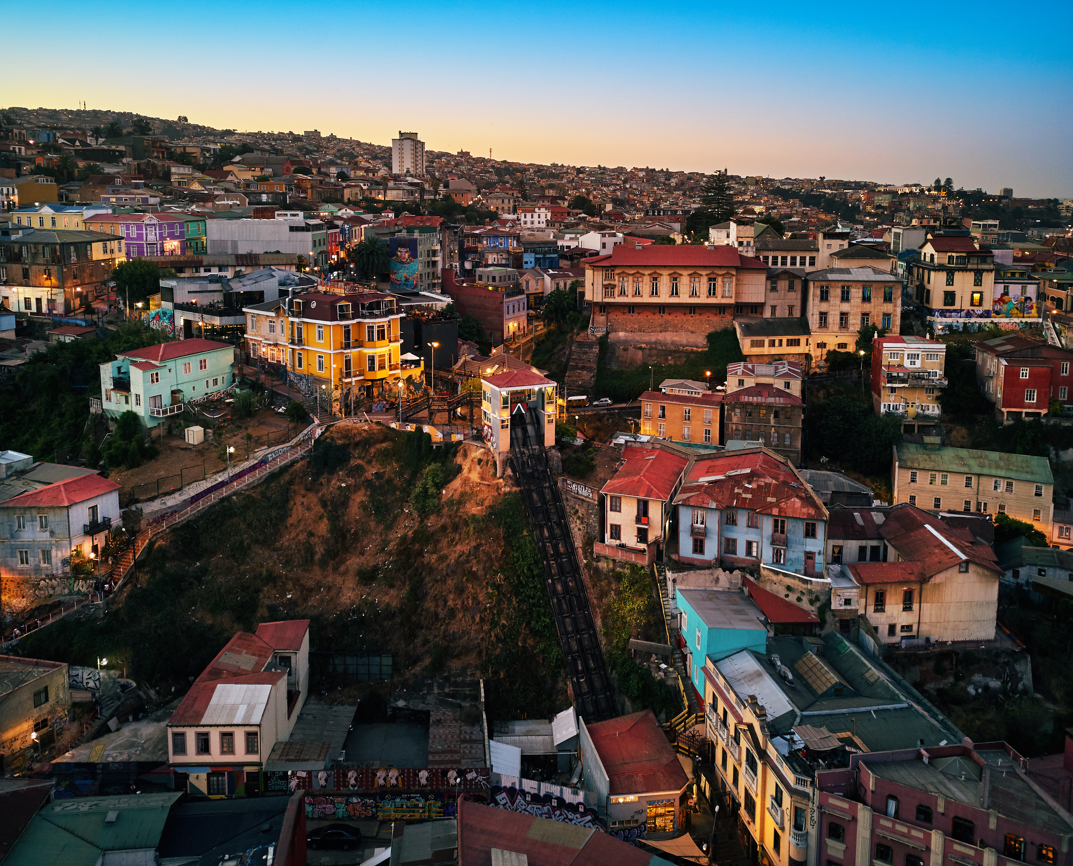 Cerro Concepción, Valparaíso